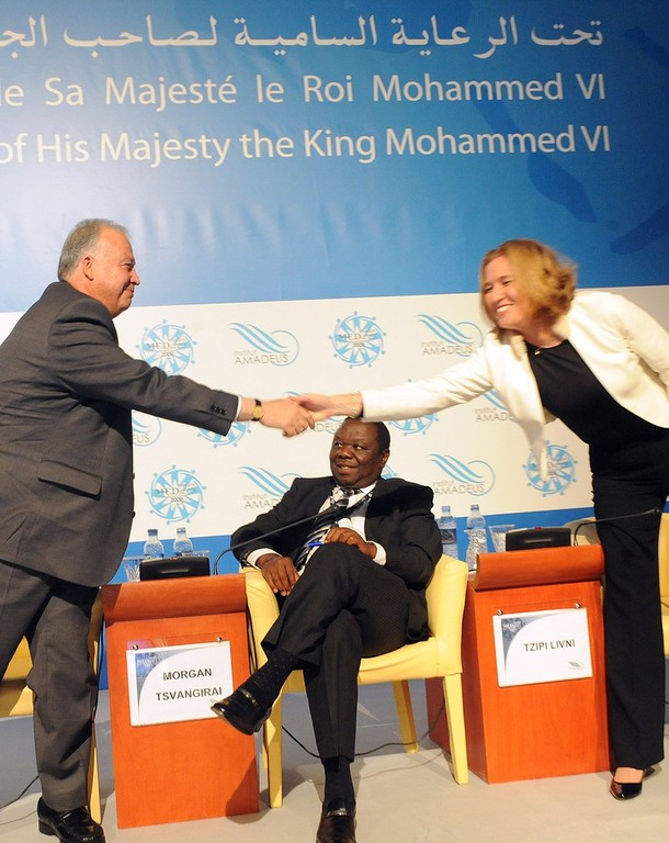 Tvipi Livni et Rafik Houssaini au Forum MEDays 2009